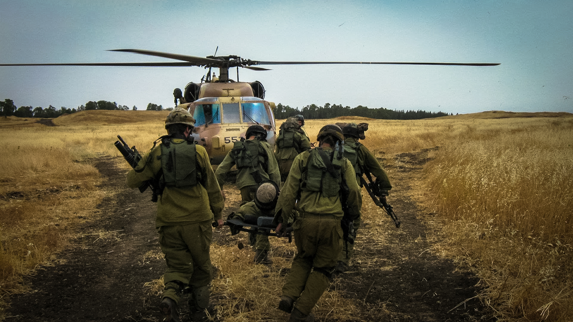 פלס"ר 401 בתרגיל